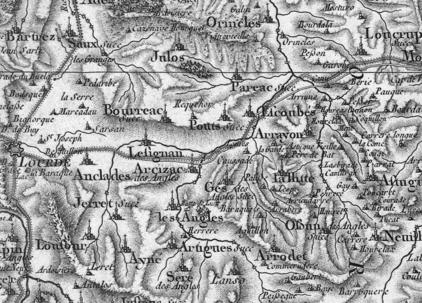 Extrait d'une carte de Cassini dans une version établie sous le premier Empire, vers 1810. Elle recouvre le territoire de la Baronnie des Angles et correspond en partie à l'actuel canton de Lourdes Est. Elle livre les noms des paroisses, des succursales de paroisse avec église (succ) telle que Bourréac et des noms de hameaux sans église. L'orthographe des noms peut avoir changé par rapport à celle que l'on note dans des documents du siècle précédent. On notera que Bourréac, écrit Bourriac dans le siècle précédent, a son orthographe d'aujourd'hui et que le hameau de Récahorts est alors appelé Réquehor qui est une forme de transition succèdant à Roquehort du siècle précédent.)